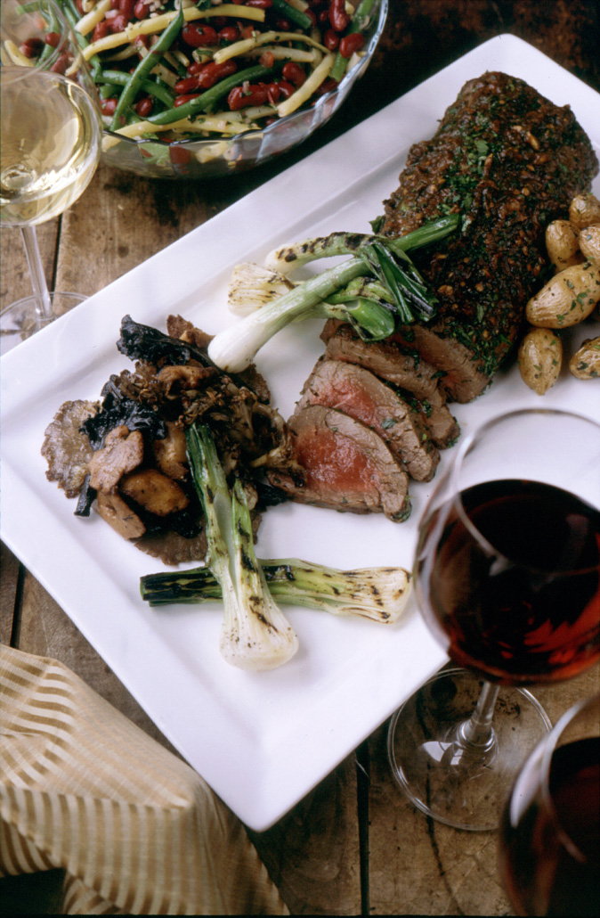 Beef Tenderloin